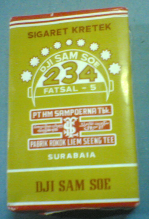 Produk hak cipta HM Sampoerna